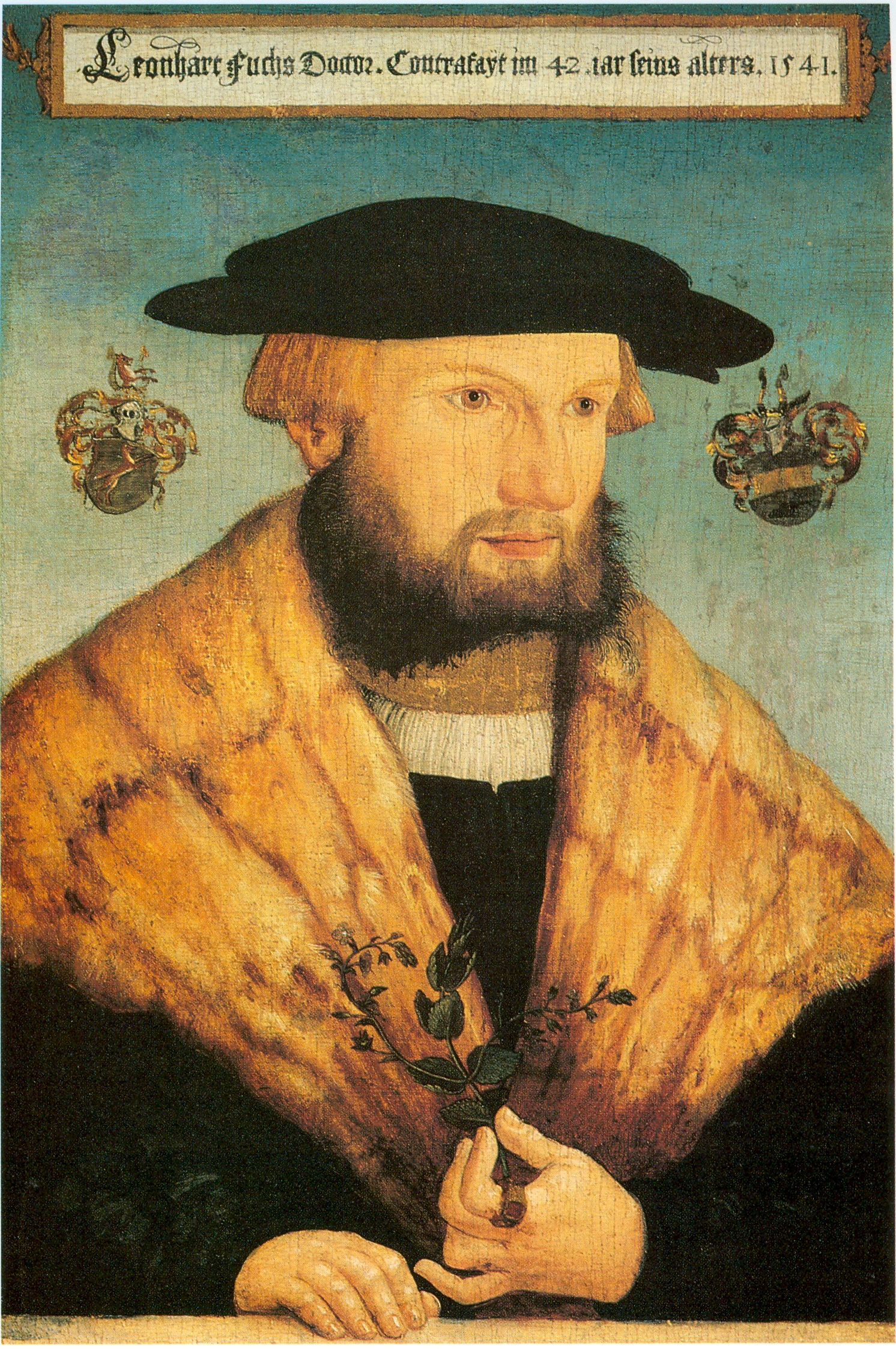 Bildnis des Botanikers Leonhart Fuchs (1501 - 1566) in einer Kartusche: Leonhart Fuchs Doctor. Contrafayt im 42 iar seins alters. 1541. Tübingen eingescannt aus: Die Renaissance im deutschen Südwesten zwischen Reformation und Dreißigjährigem Krieg. Eine Ausstellung des Landes Baden-Württemberg, Heidelberger Schloss, 21. Juni - 19 Oktober 1986